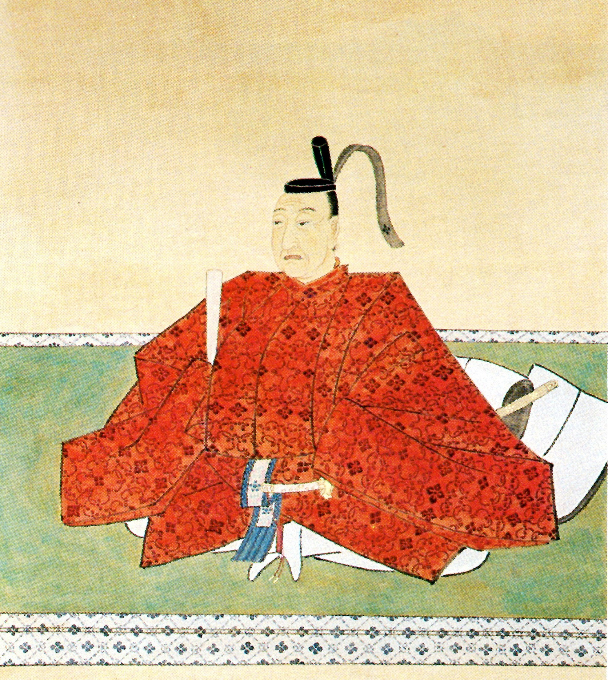 金森頼時の肖像。